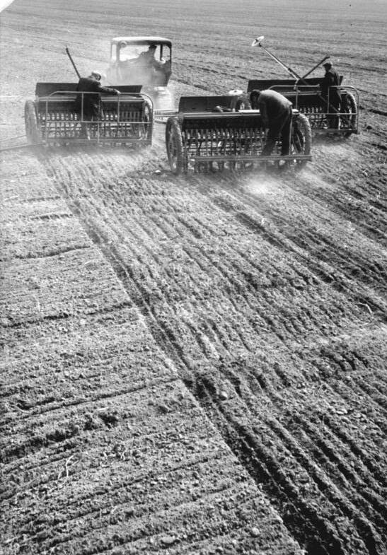 Lossow, Traktoristen bei der Aussaat Zentralbidl-Weiß 16.4.1963 Bezirk Frankfurt-Oder hat Getreideaussaat beendet. Zahlreiche Genossenschaftsbauern, Landarbeiter der VEG und Traktoristen nutzten das günstige Wetter und setzten auch während der Osterfeiertage die Bestellarbeiten fort. Dadurch konnte u.a. im Bezirk Frankfurt-Oder die Aussaat des Sommergetreides abgeschlossen werden. Zu den Genossenschaften des Bezirks Frankfurt-Oder, die schon Mitte der vorigen Woche die Sommergetreideaussaat beendeten, gehört die in der Nähe der Bezirkshauptstadt gelegene LPG "Erntesegen" in Lossow. UBz: Die letzten 25 ha der LPG Lossow werden mit Sommergetreide bestellt, eingesetzt ist ein Dreierzug der MTS Finkenheerd.